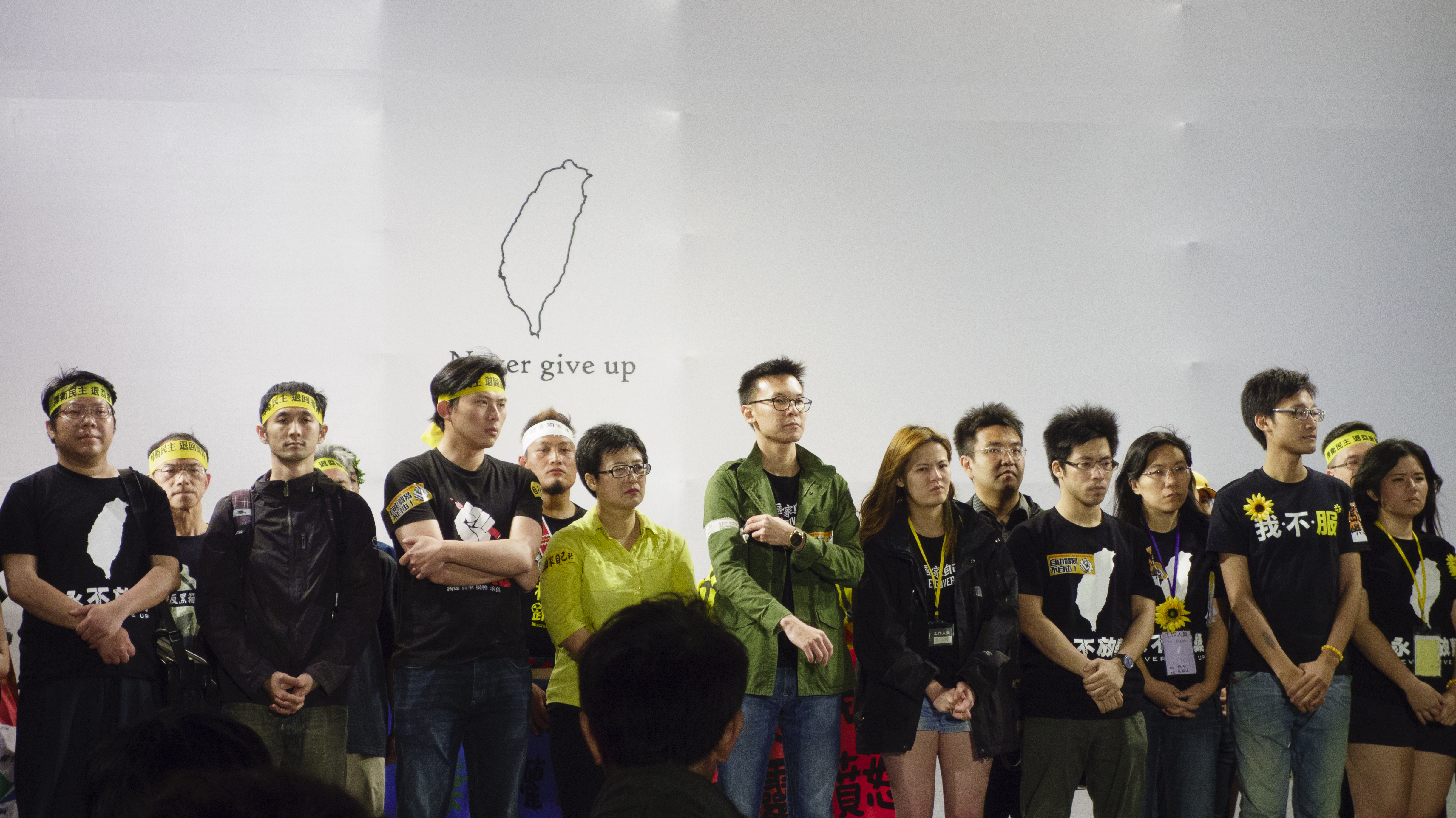 DSC00543 2014 太陽花學運與反服貿遊行